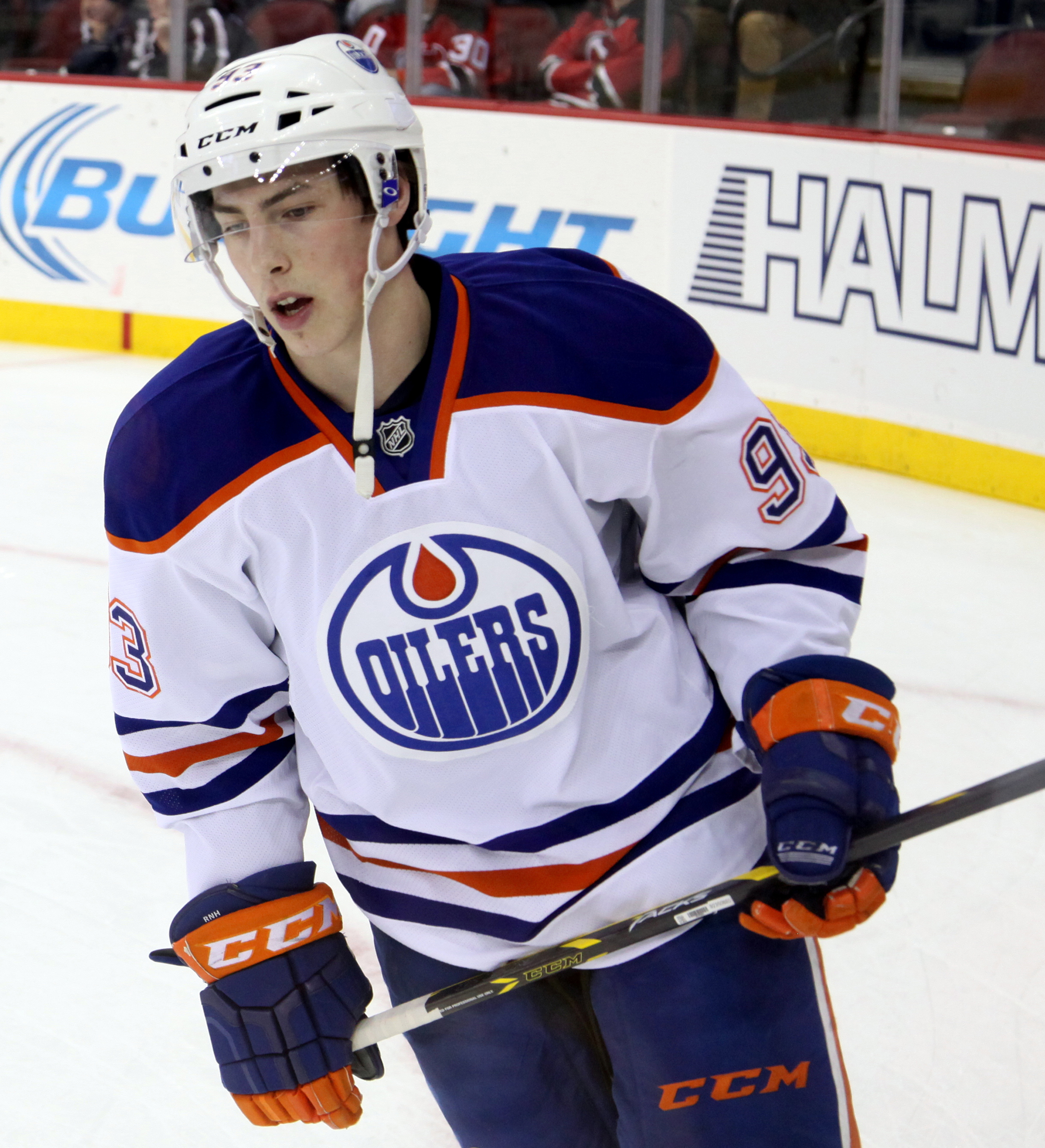 Ryan Nugent-Hopkins in February 2015.